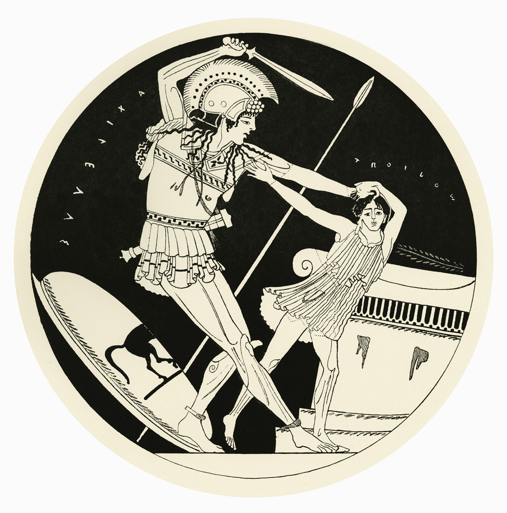 Troilos Slain by Achilles, drawing after interior tondo of an Attic red-figure kylix Dugald Sutherland MacColl (British draftsman, 1859-1948) 1894 22 cm (diameter) Drawing after an Attic red-figure kylix attributed to Onesimos (painter) and Euphronios (potter), in the collection of the Museo Archeologico Nazionale, Perugia. Published in Harrison, Jane Ellen and D.S. MacColl. Greek vase paintings; a selection of examples, with preface, introduction and descriptions. London: T.F. Unwin, 1894.